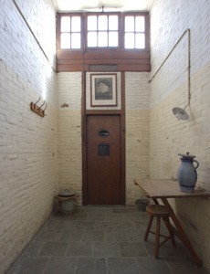 Doodencel 601 in het Oranjehotel